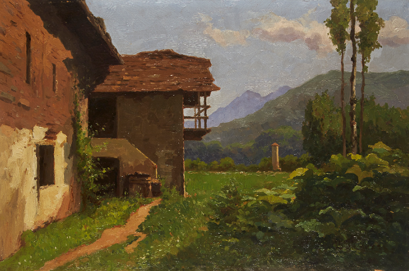 "Cascina con sfondo di montagne", olio su cartone, firmato, 38.5 x 58 cm, collezione privata